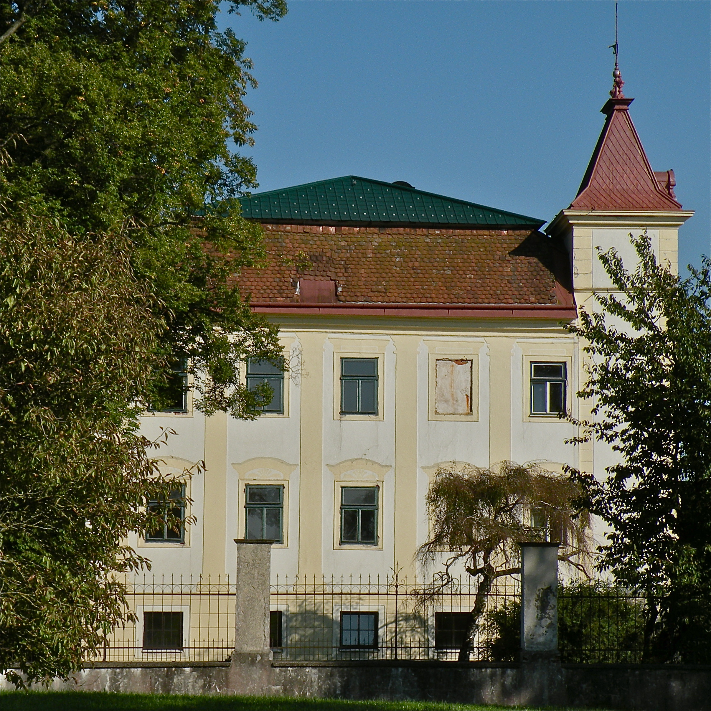 Schloss Grünau in Ried in der Riedmark im Bezirk Perg